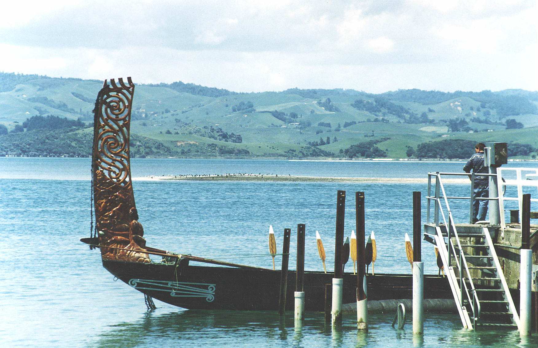 Waka sternpost